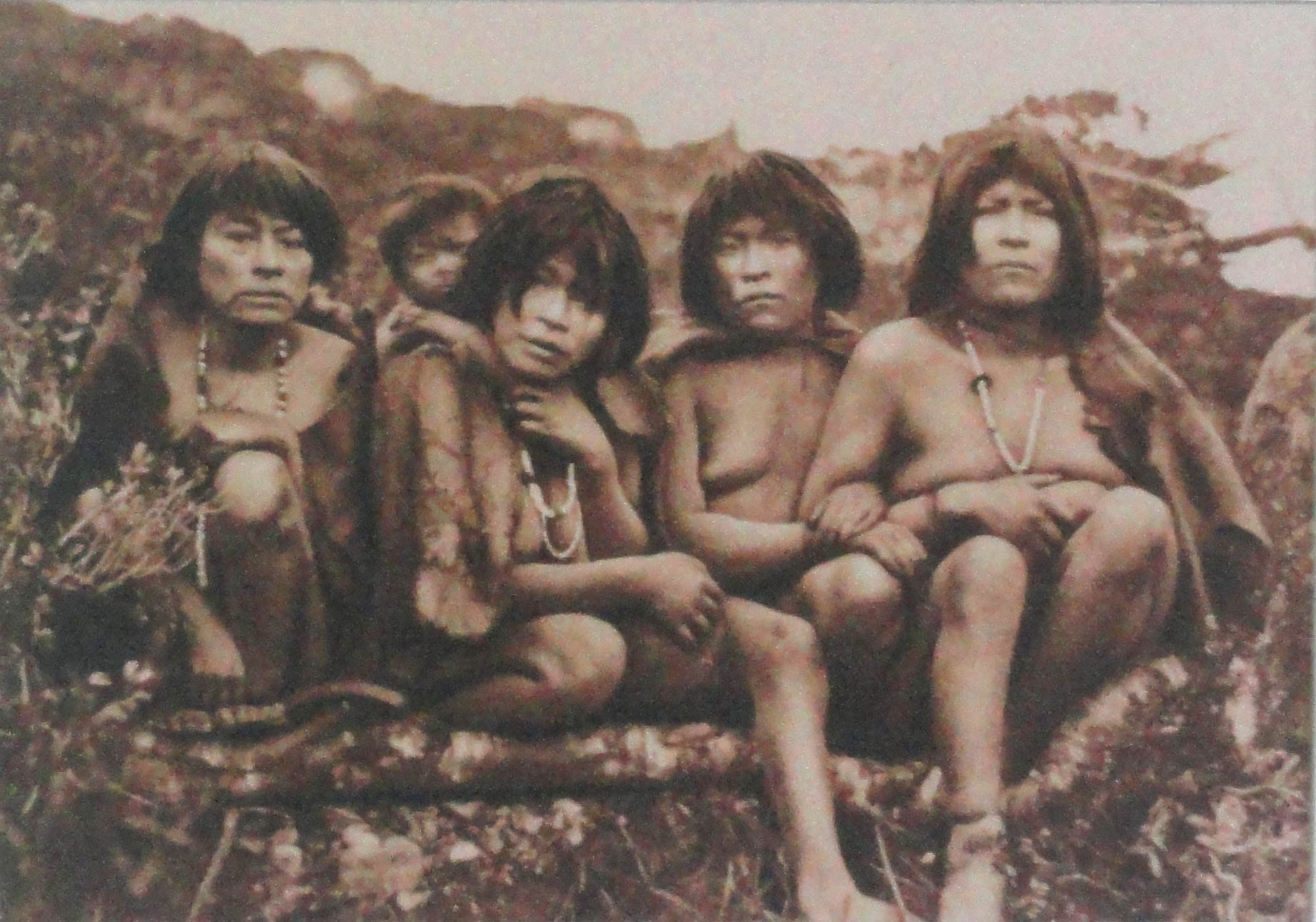 indígenas Yamana